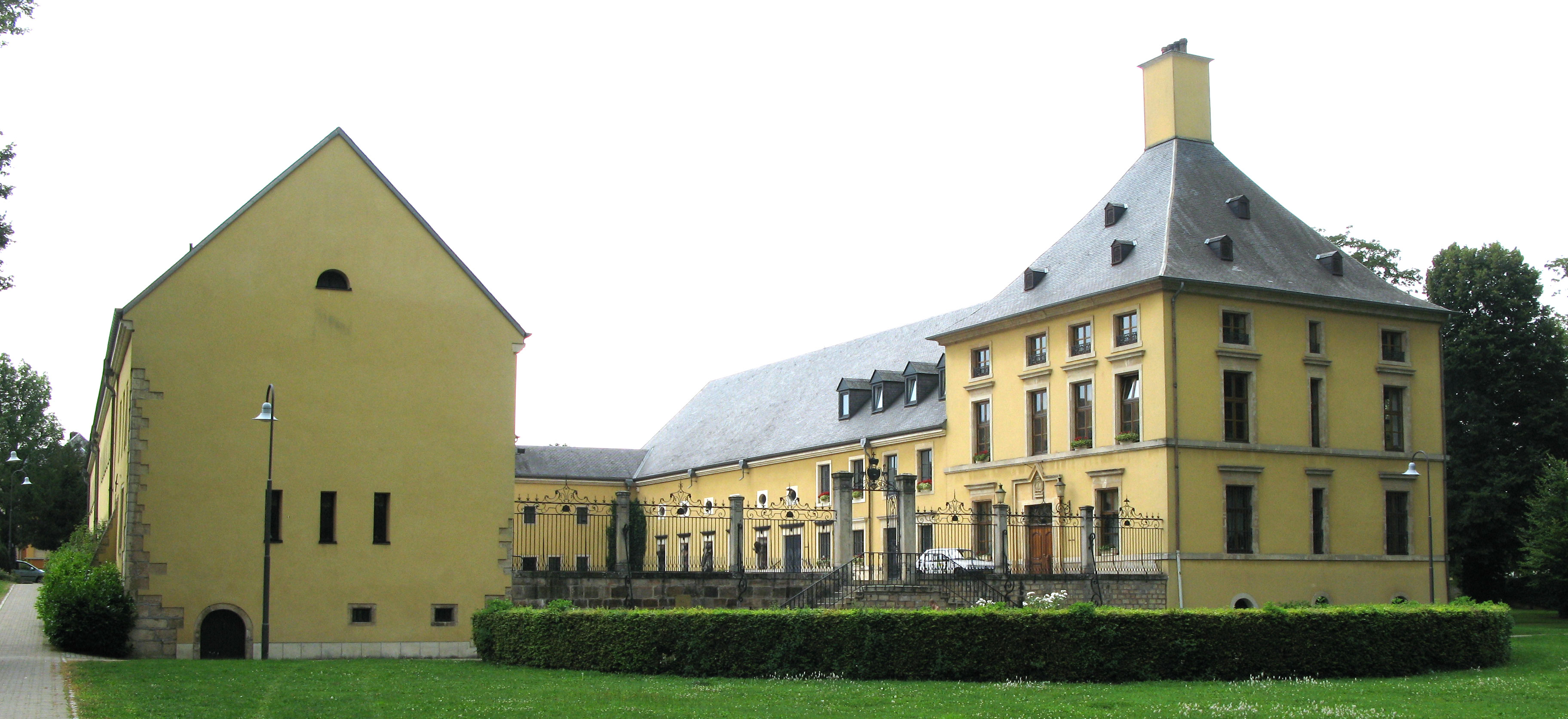 Sujet:Collart-Schlass Beetebuerg Source:Eege Foto vum User:Cornischong